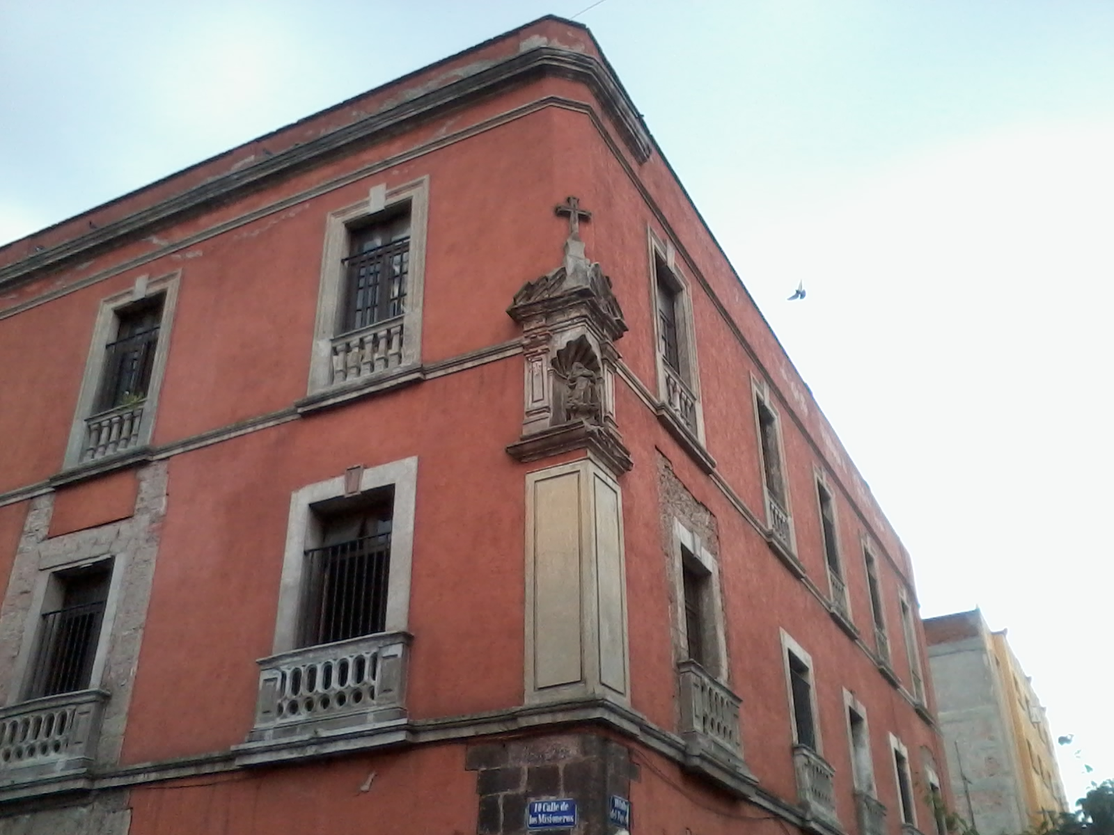 Unión de Mujeres Mexicanas A.C. "La Semilla" (Union of Mexican Women) (Misioneros 1, Centro Histórico, Mexico City)